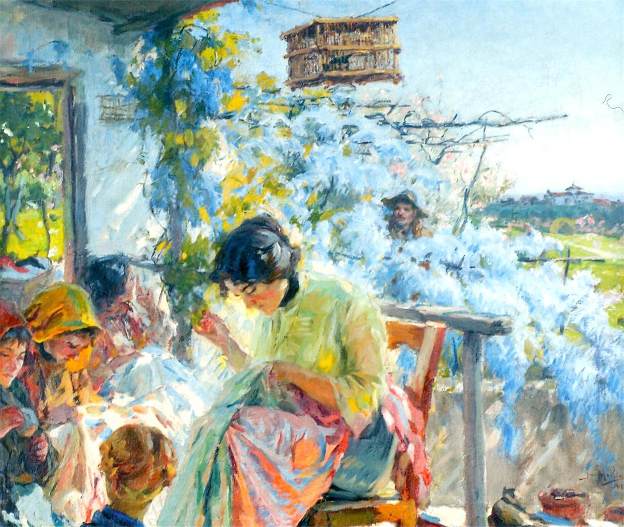 Título: Varanda dos rouxinóis Autor: José Malhoa (1855-1933) Procedência: Colecção particular Data: 1915 Dimensões: 45 x 42 cm Créditos fotográficos: António Homem Cardoso (filho) ou Pedro Aboim Borges Observações: Óleo sobre tela. Esta imagem foi retirada do livro: ELVAS, José Manuel [et al.] - José Malhoa. Lisboa : ARTing, 2008. ISBN 978-88-87915-44-0.